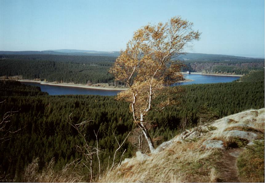 Blick vom Scharfenstein auf die Eckertalsperre, Ende Oktober 2005